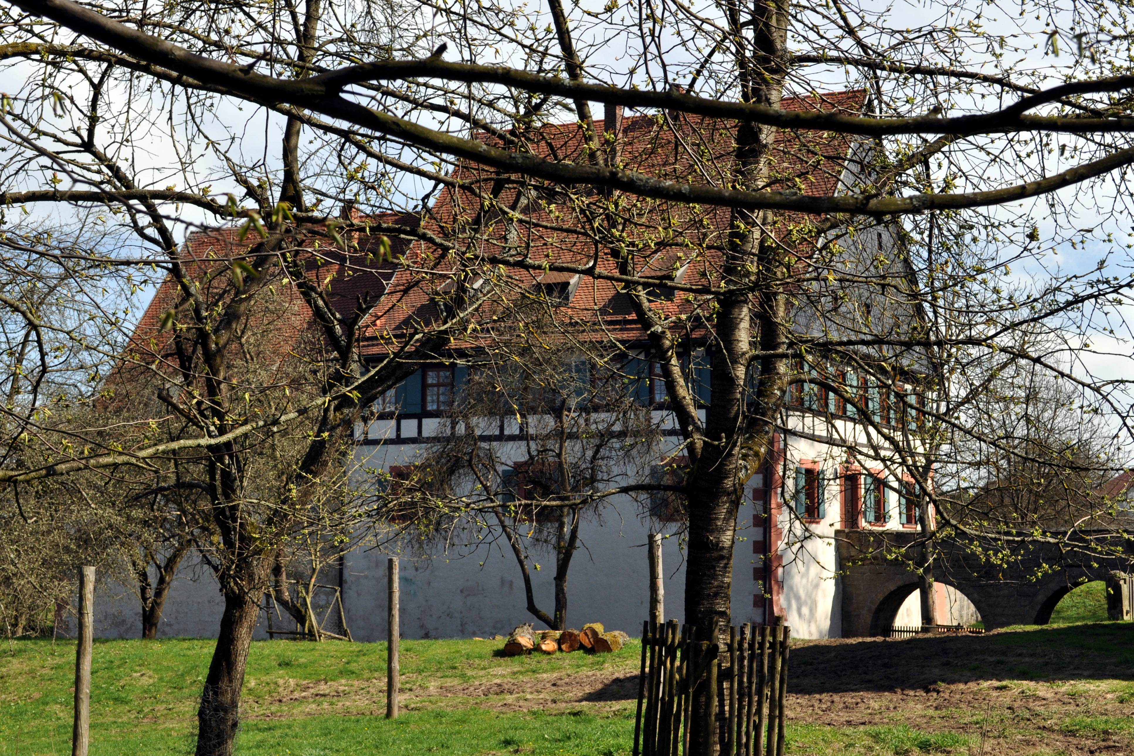 Blick aus Nordwestlicher Richtung auf das Schloss Ebneth